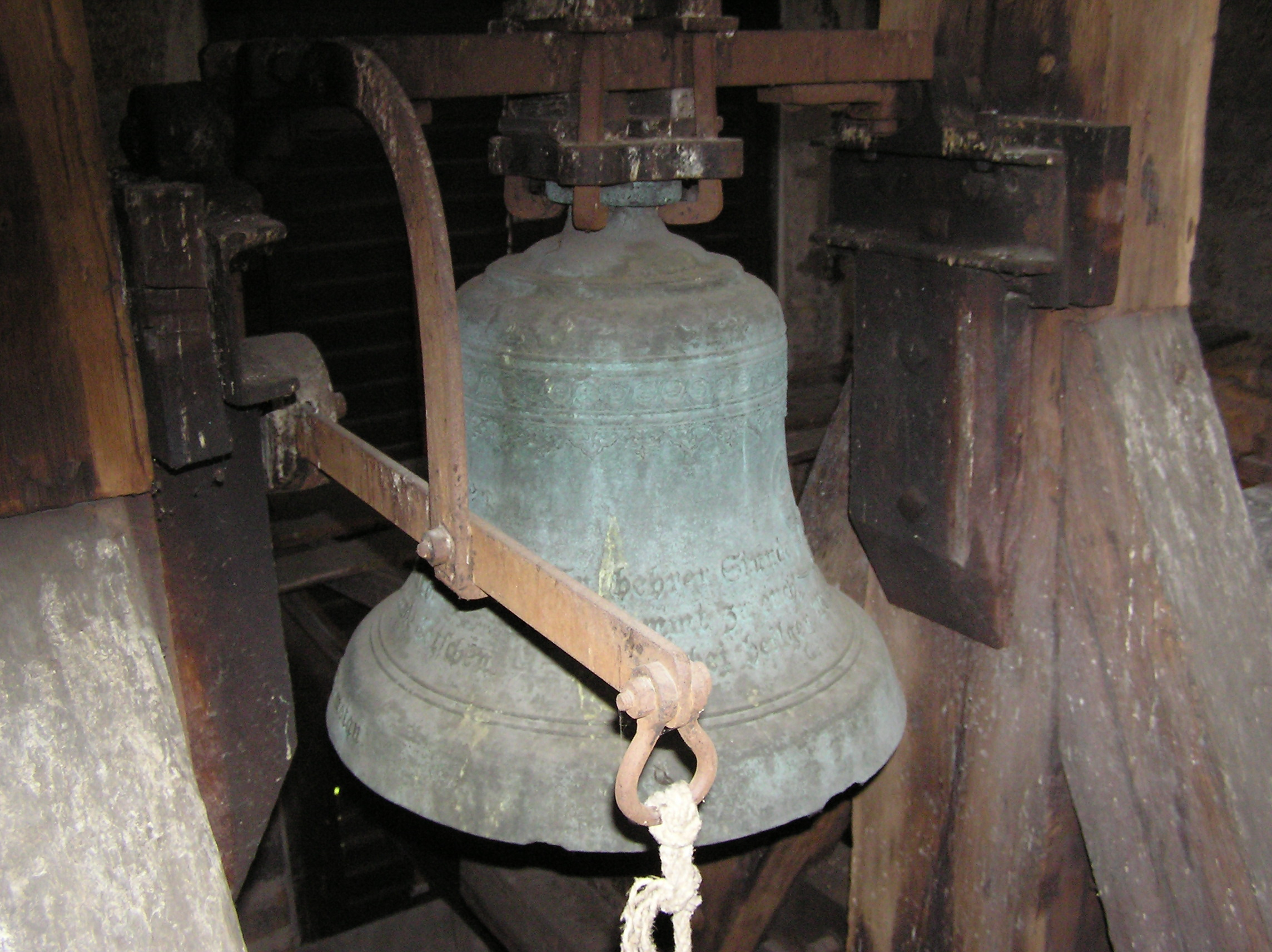 Děčín, zvon Jesus